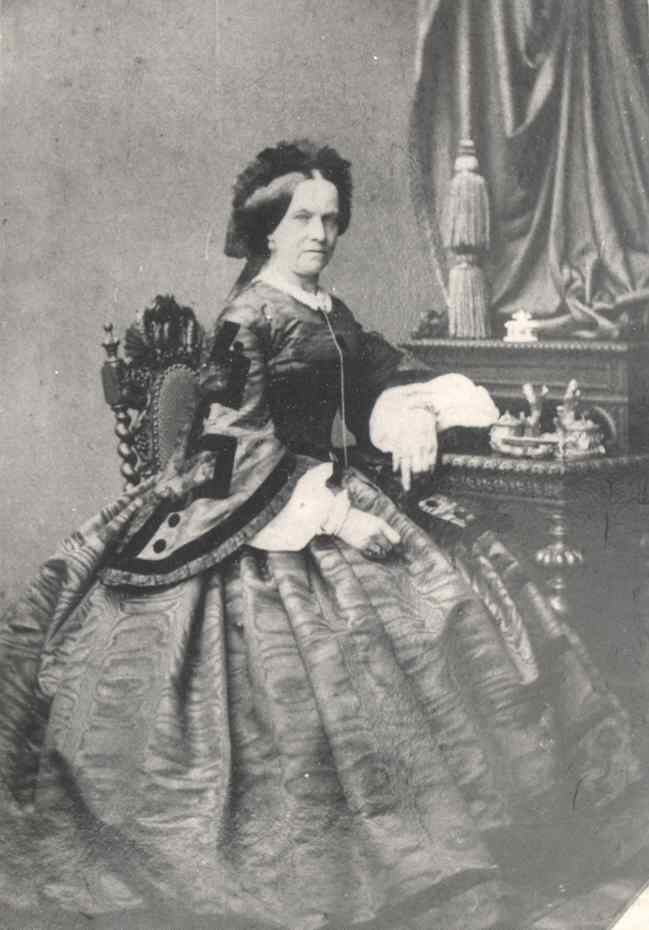 Friedrica Jauch geb. Hentzen (1809–1864), Herrin auf Wellingsbüttel